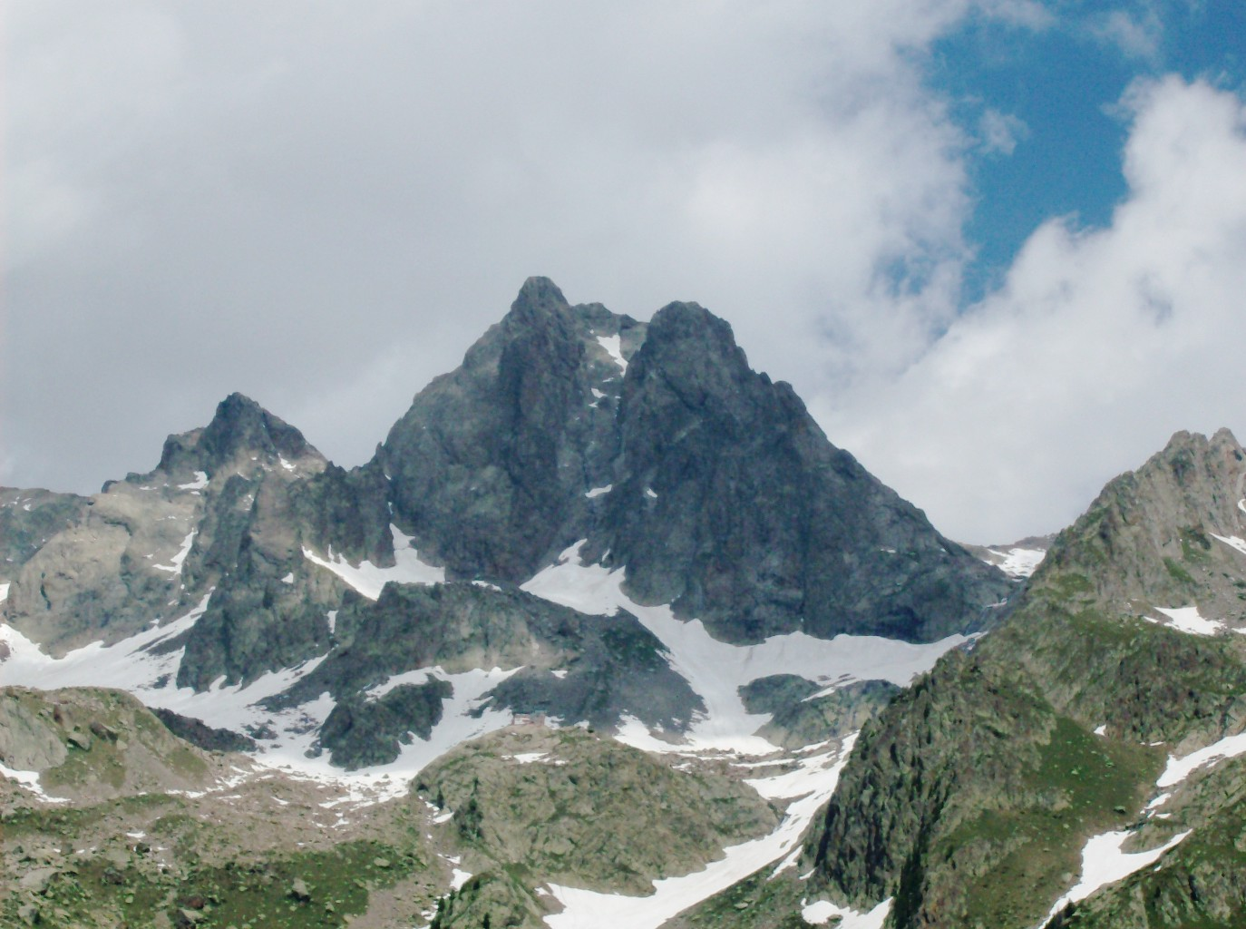 La Cima di Nasta (a destra) e la Cima Paganini (a sinistra), nel massiccio dell'Argentera